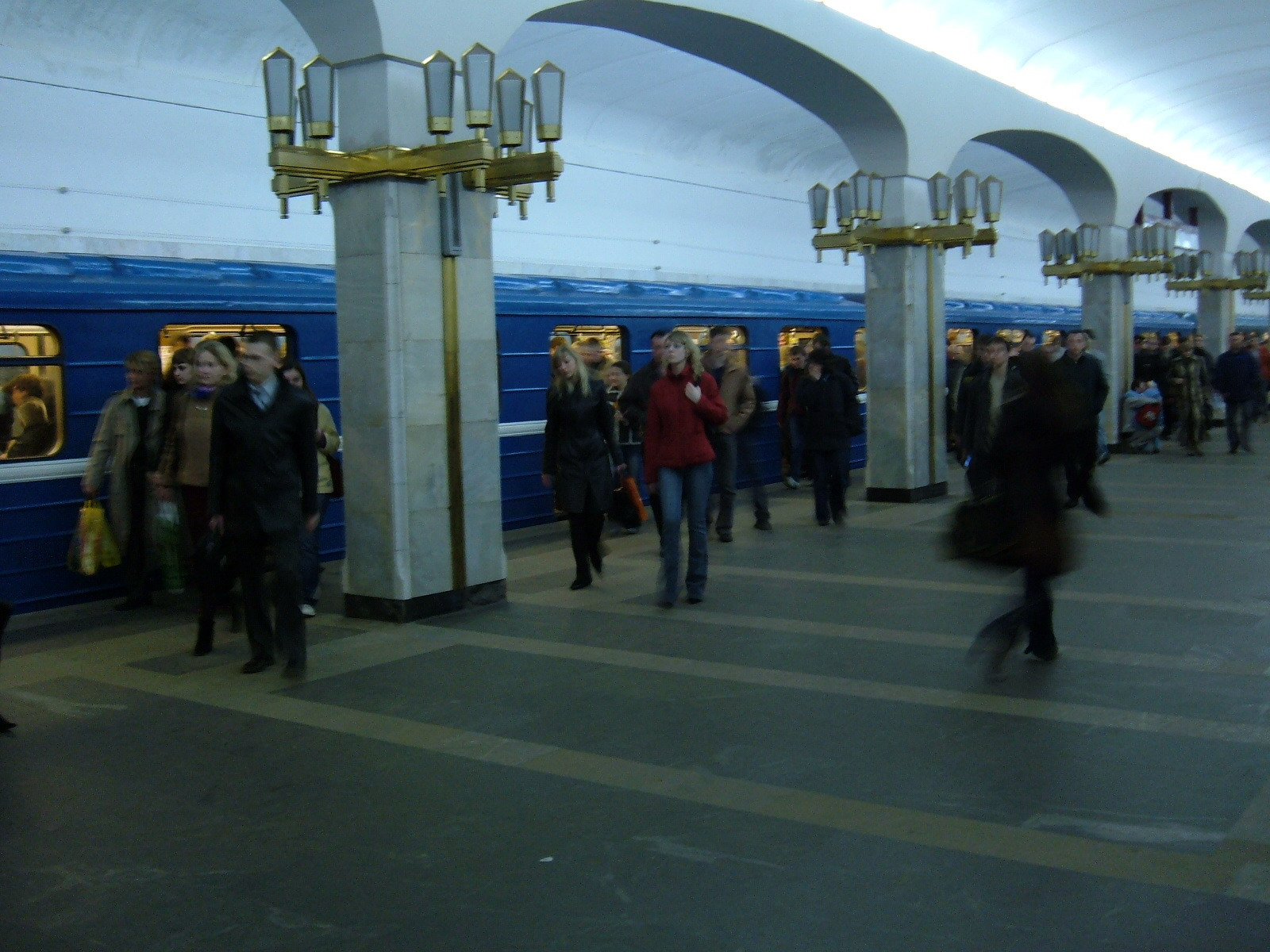 Metro station "Puszkinskaja" in Minsk, Belarus. 23:30, Friday.